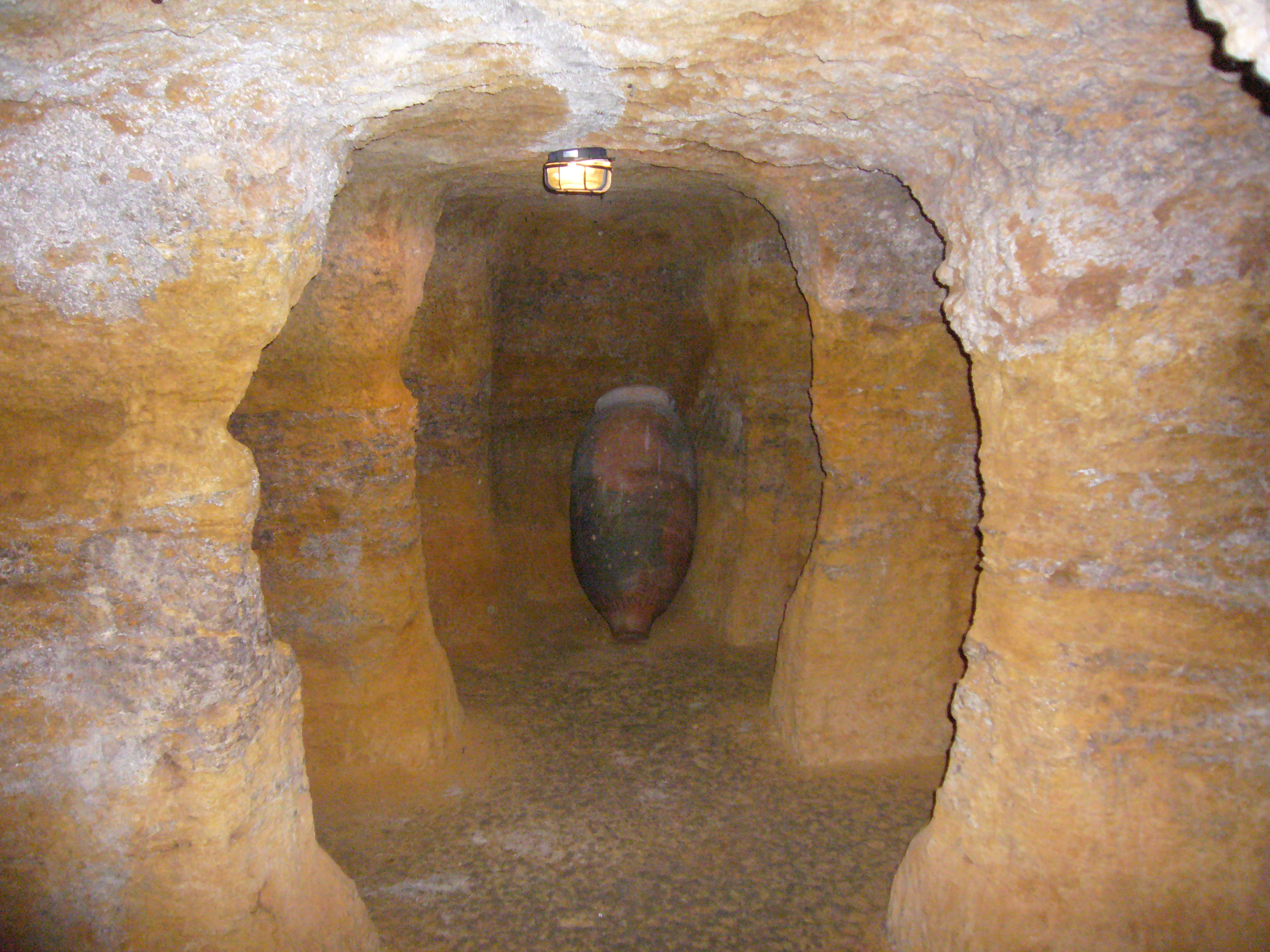 Cueva de Medrano situada subterránea de la Casa de Medrano donde estuvo preso Miguel de Cervantes. Situada en Argamasilla de Alba (Ciudad Real).